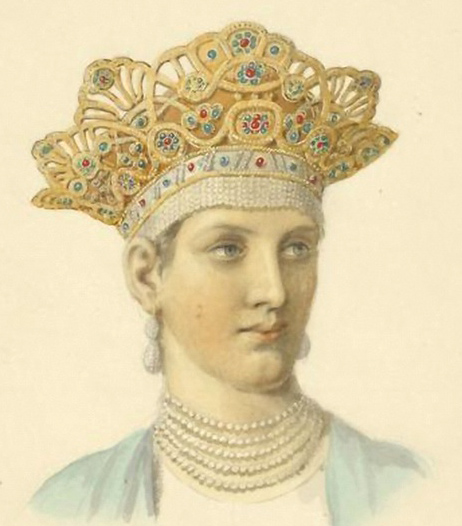 Головной убор белозерской девицы (коруна). Ф. Г. Солнцев «Одежды Русского государства»